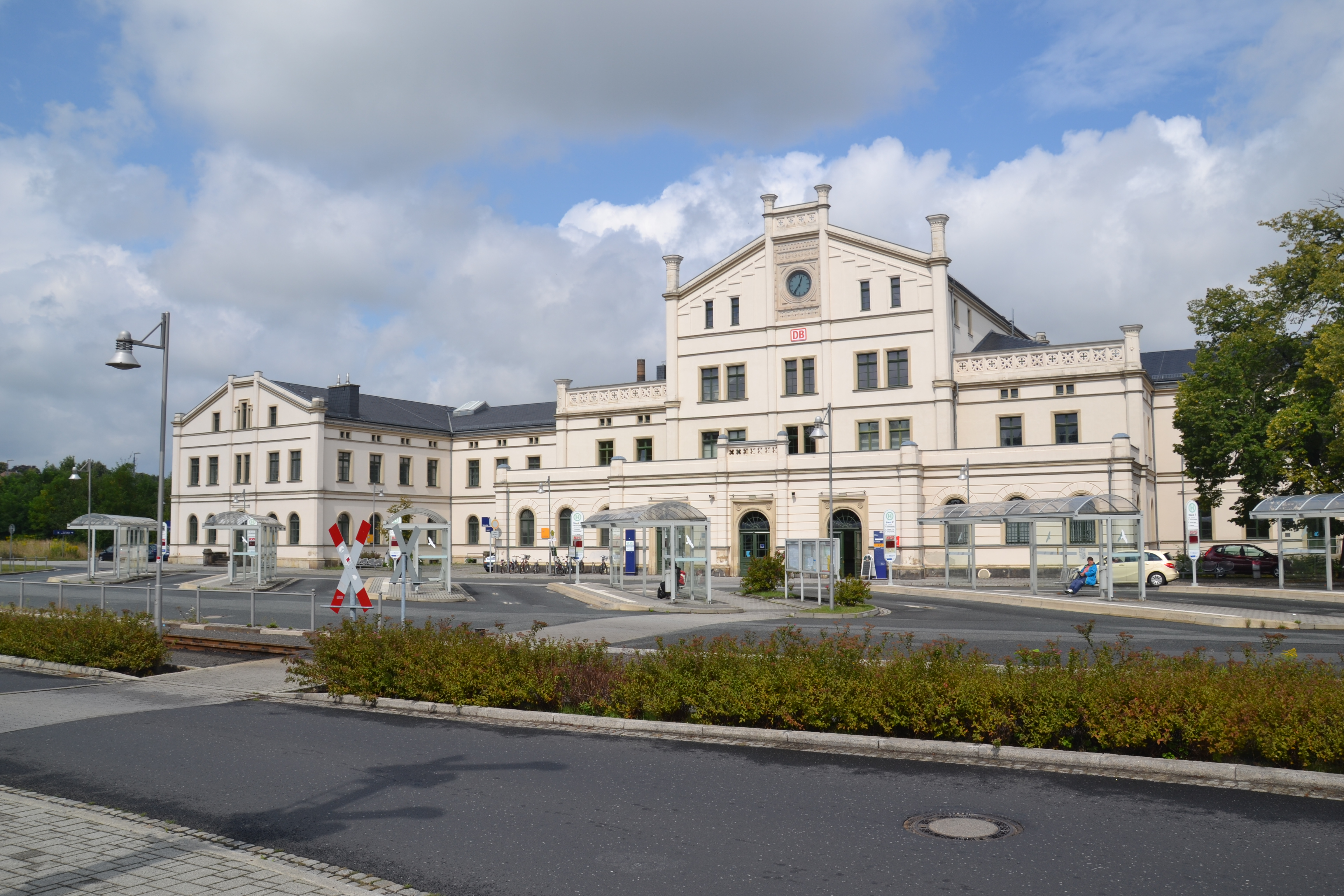 Widok od strony miasta na dworzec kolejowy w Zittau